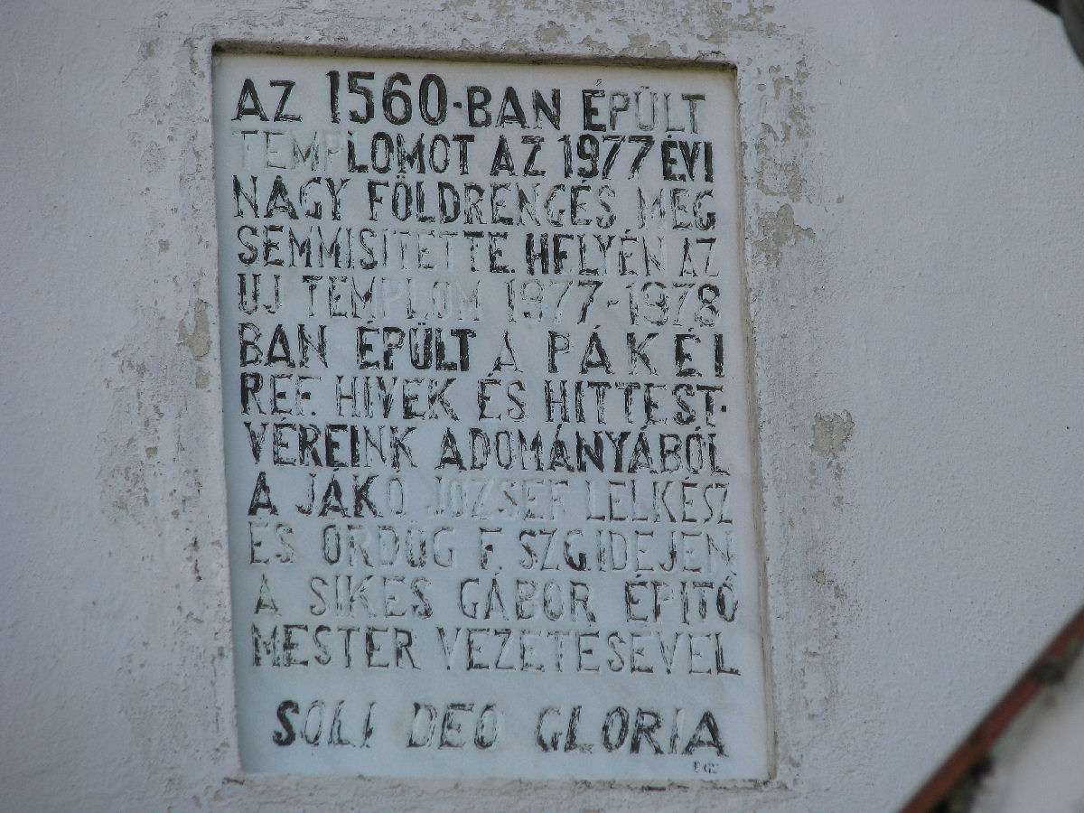 Pákéi templom felirata